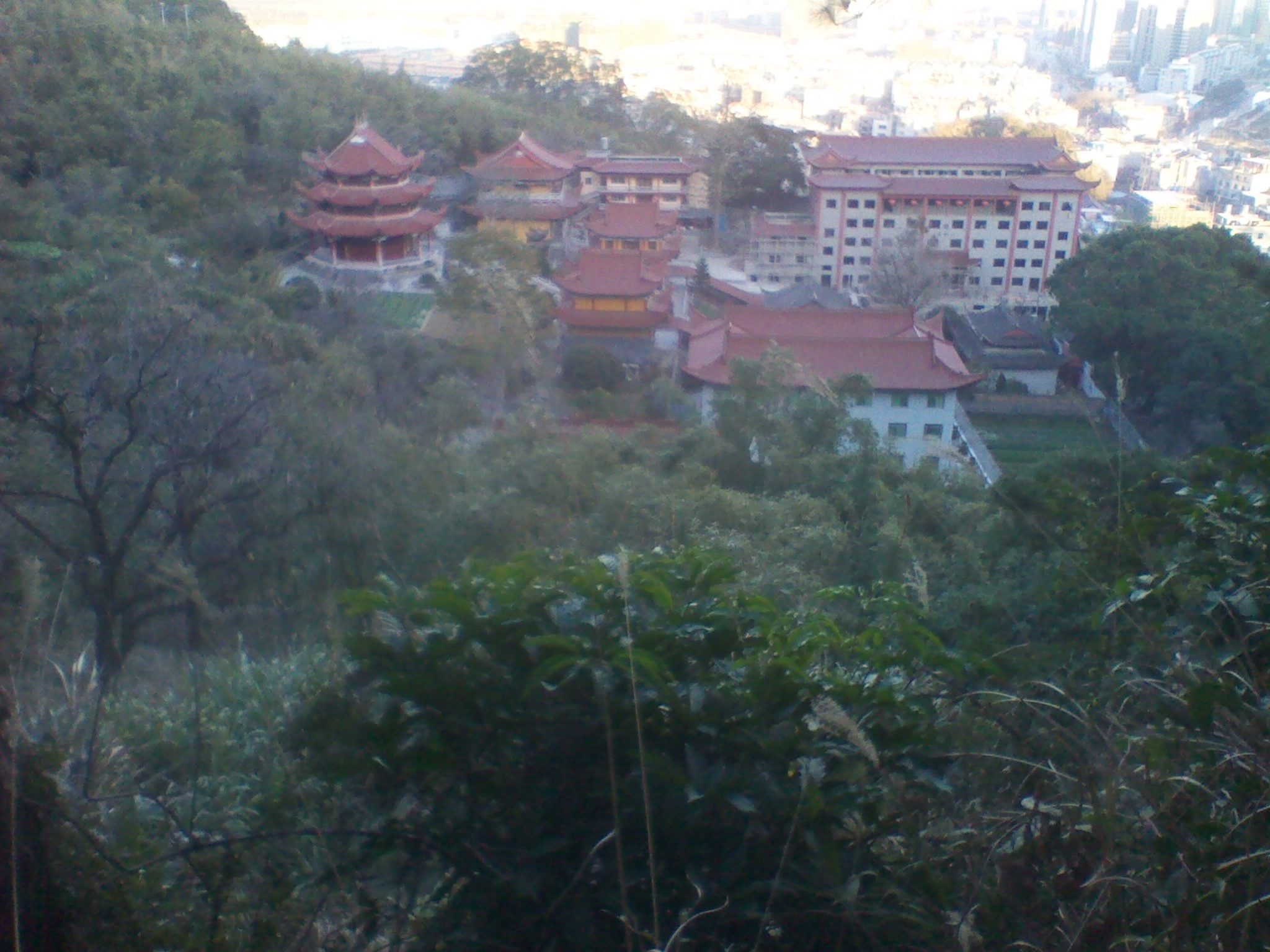 霞浦建善寺俯视